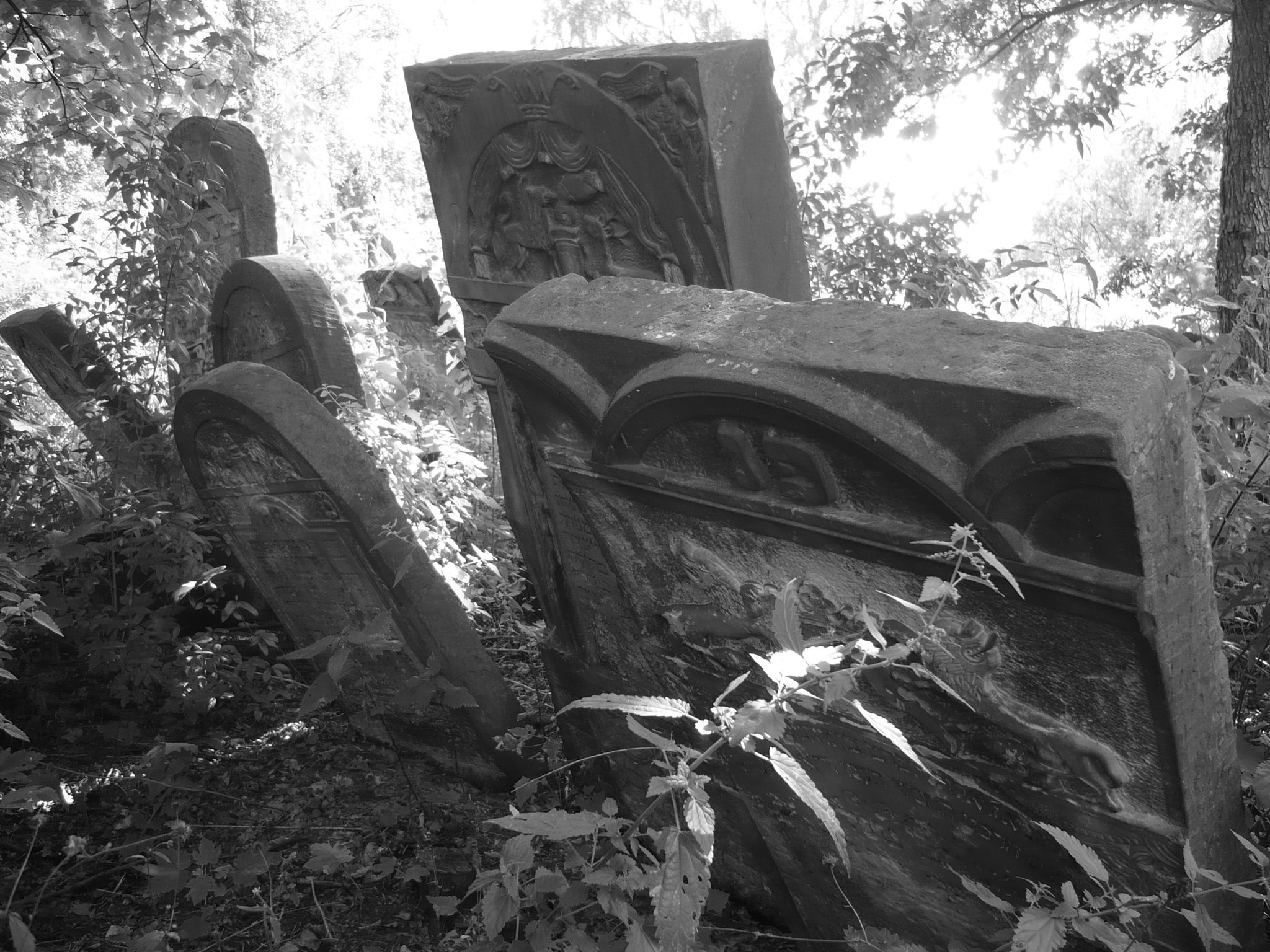 Macewy na cmentarzu żydowskim w Radomsku